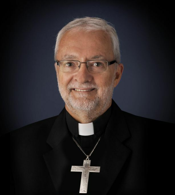 Monseigneur Luc Bouchard, évêque du diocèse catholique de Trois-Rivières, en Mauricie (Québec)